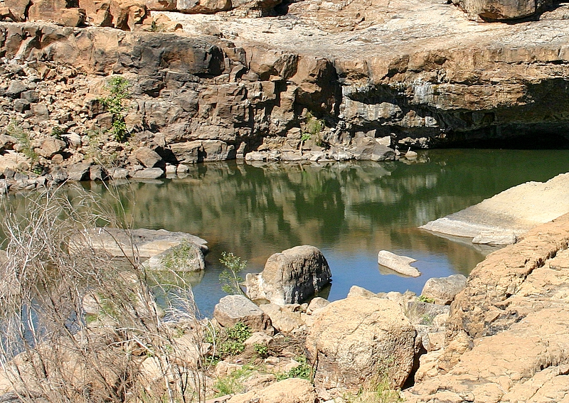 Leichhardt Falls